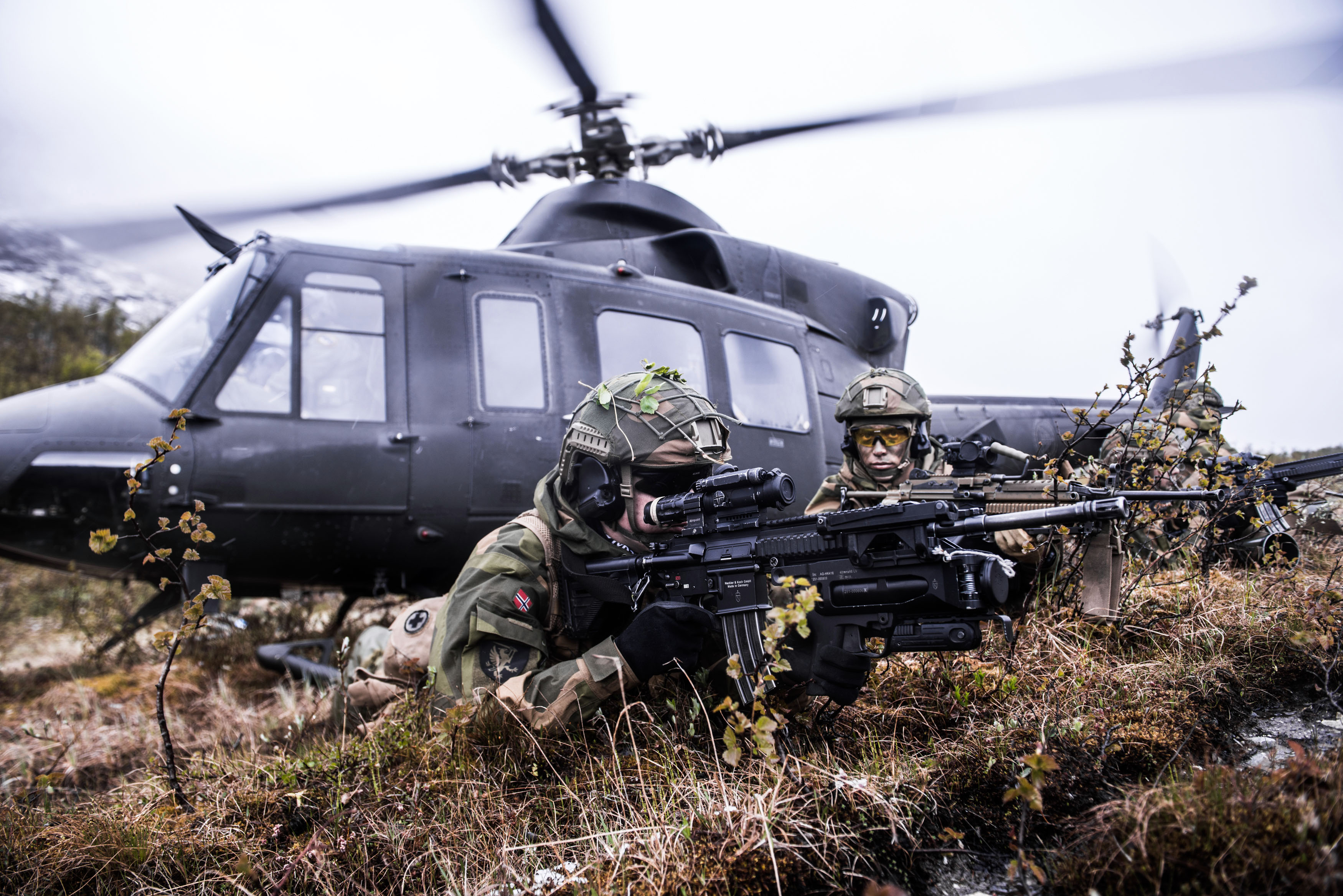 Brigadens soldater samvirker med helikopter fra Luftforsvaret